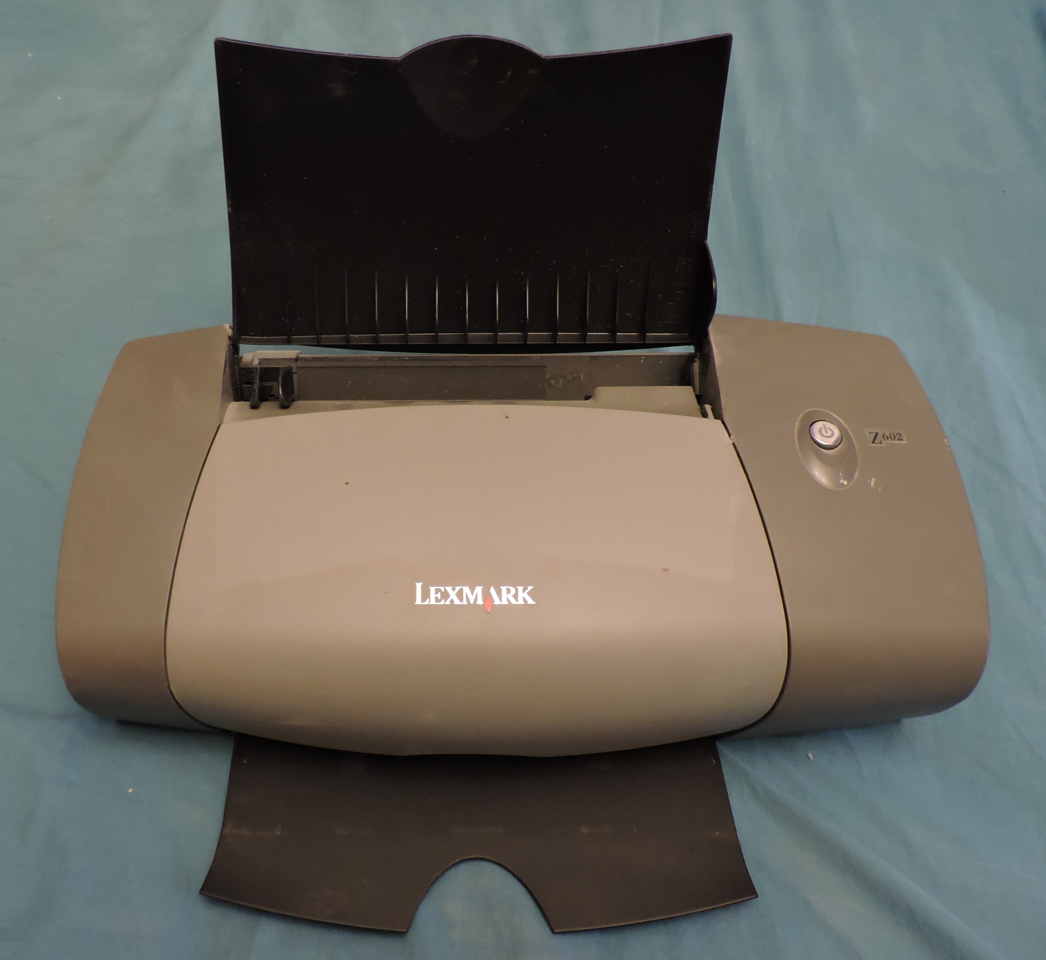 Lexmark Z602 – это настольный принтер с технологией цветной термоструйной печати. Данная модель идеально подойдёт для домашней печати фотографий, открыток и флаеров. Максимальная нагрузка на принтер составляет 2000 страниц в месяц